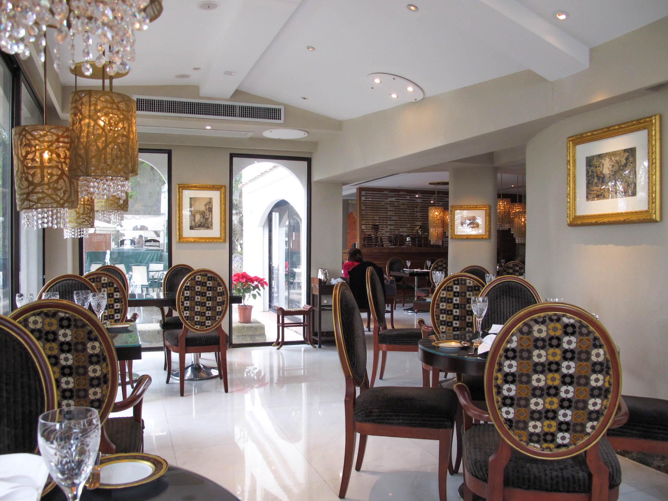 Pousada de São Tiago La Paloma